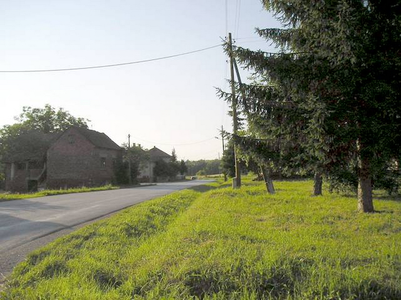 Krkač - Main Road